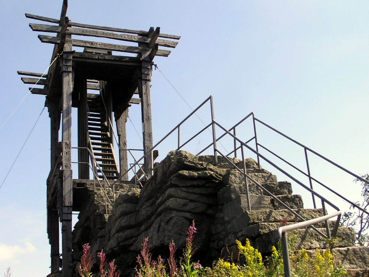 Description: Backoefele auf dem Schneeberg Source: Selbst fotografiert Date: 18. August 2005 Author: Schubbay